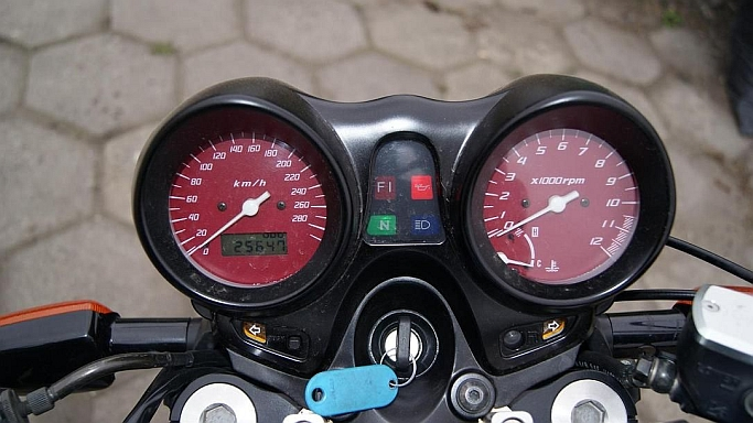 Honda X11 zegary